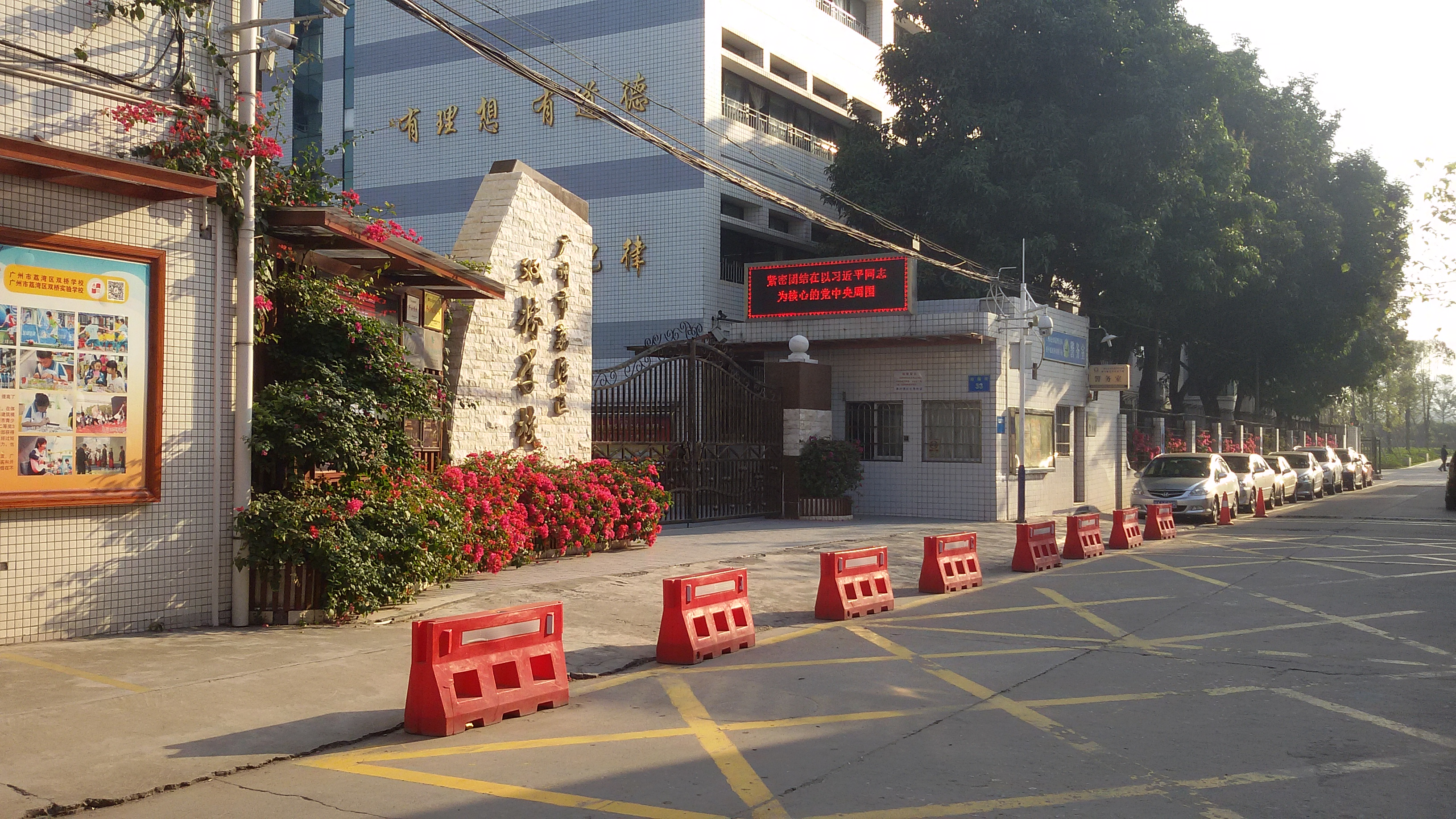 粵語: 荔灣區雙橋學校